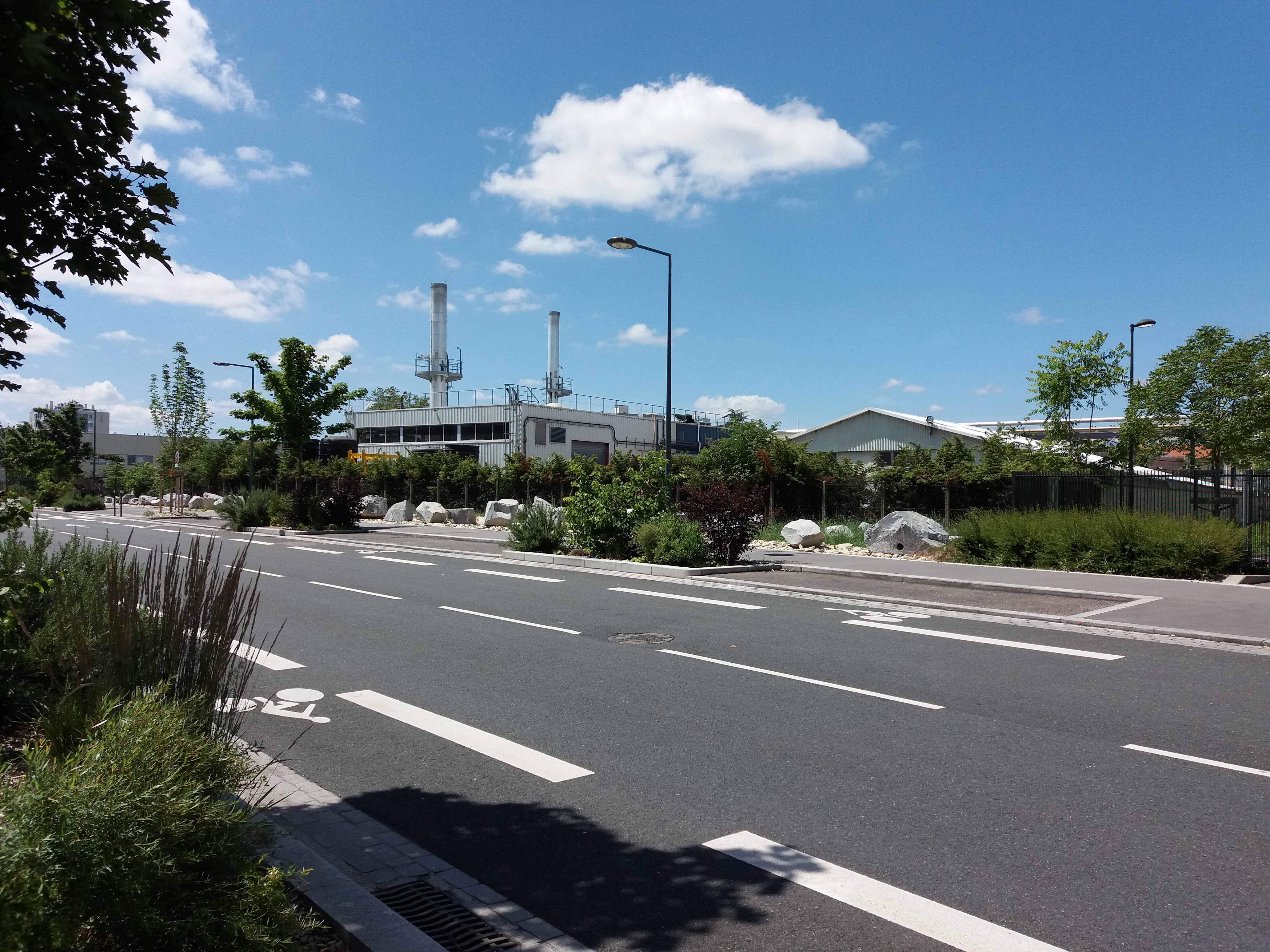 Usine.